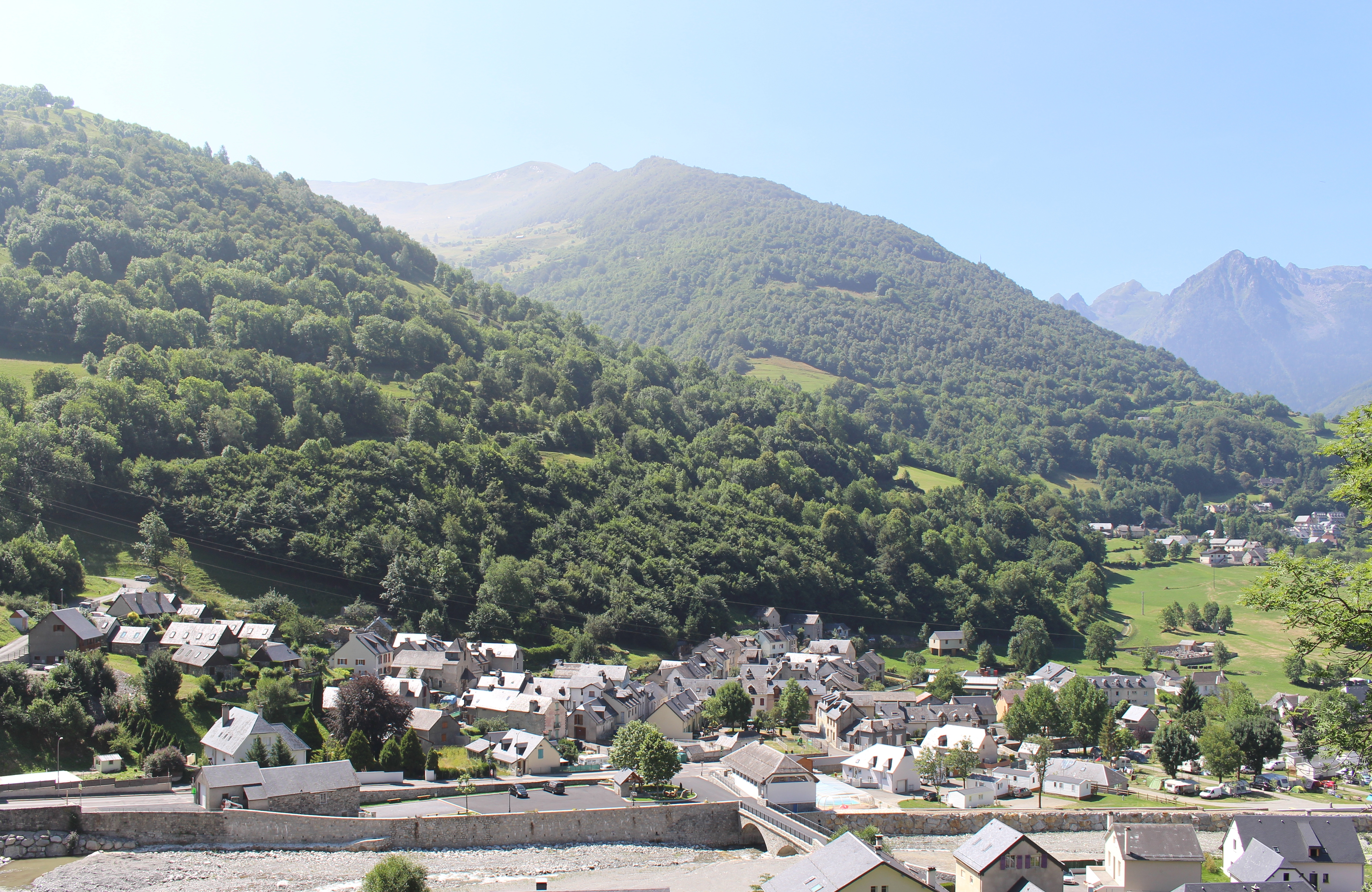 Esterre (Hautes-Pyrénées)